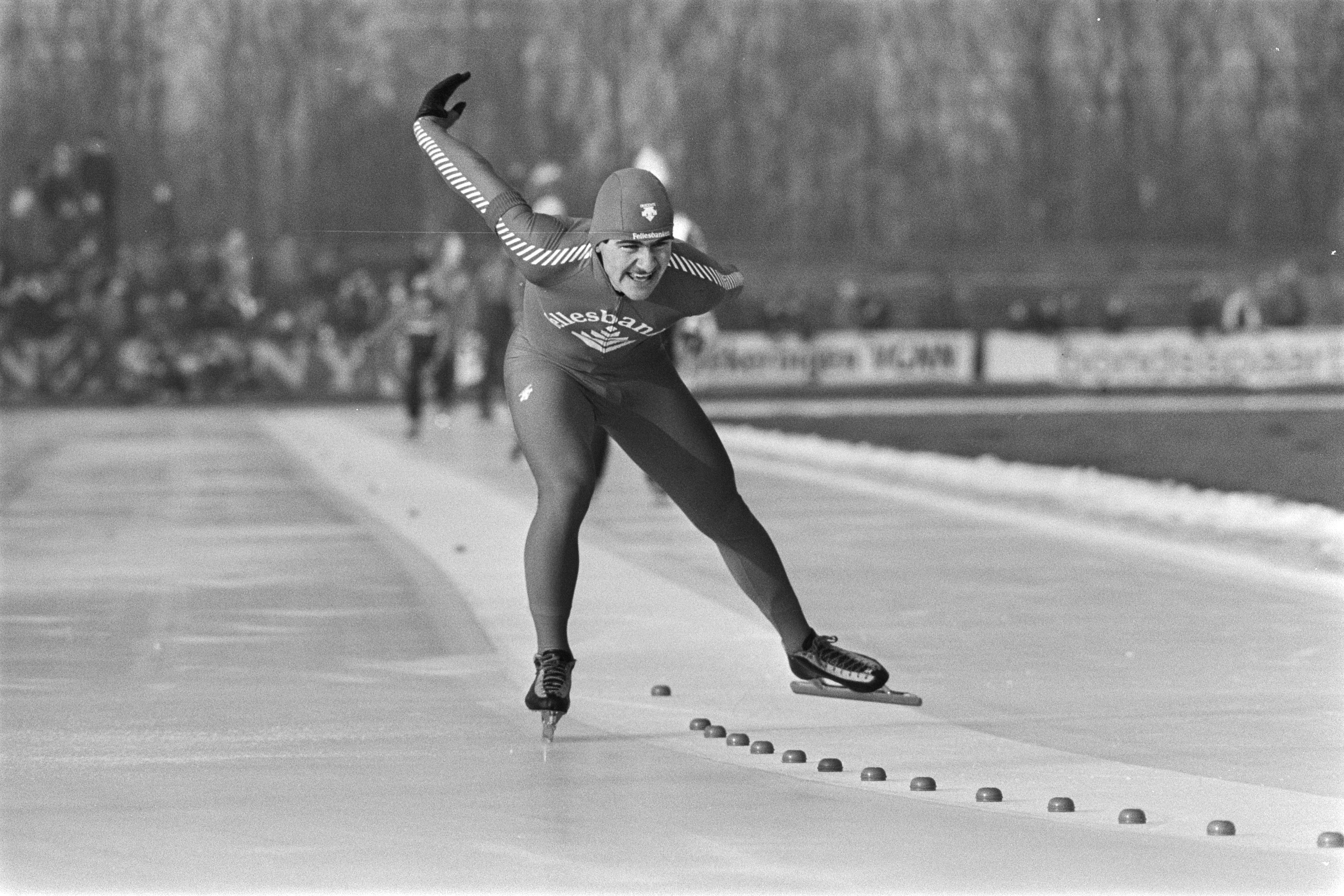 Collectie / Archief : Fotocollectie Anefo Reportage / Serie : [ onbekend ] Beschrijving : Heerenveen, landenwedstrijd, Nederland, Noorwegen, Zweden schaatsen voor heren; Falk Larsen in actie (1500 m) Datum : 18 december 1983 Locatie : Friesland, Heerenveen Trefwoorden : SCHAATSEN, sport Fotograaf : Bogaerts, Rob / Anefo Auteursrechthebbende : Nationaal Archief Materiaalsoort : Negatief (zwart/wit) Nummer archiefinventaris : bekijk toegang 2.24.01.05 Bestanddeelnummer : 932-8133